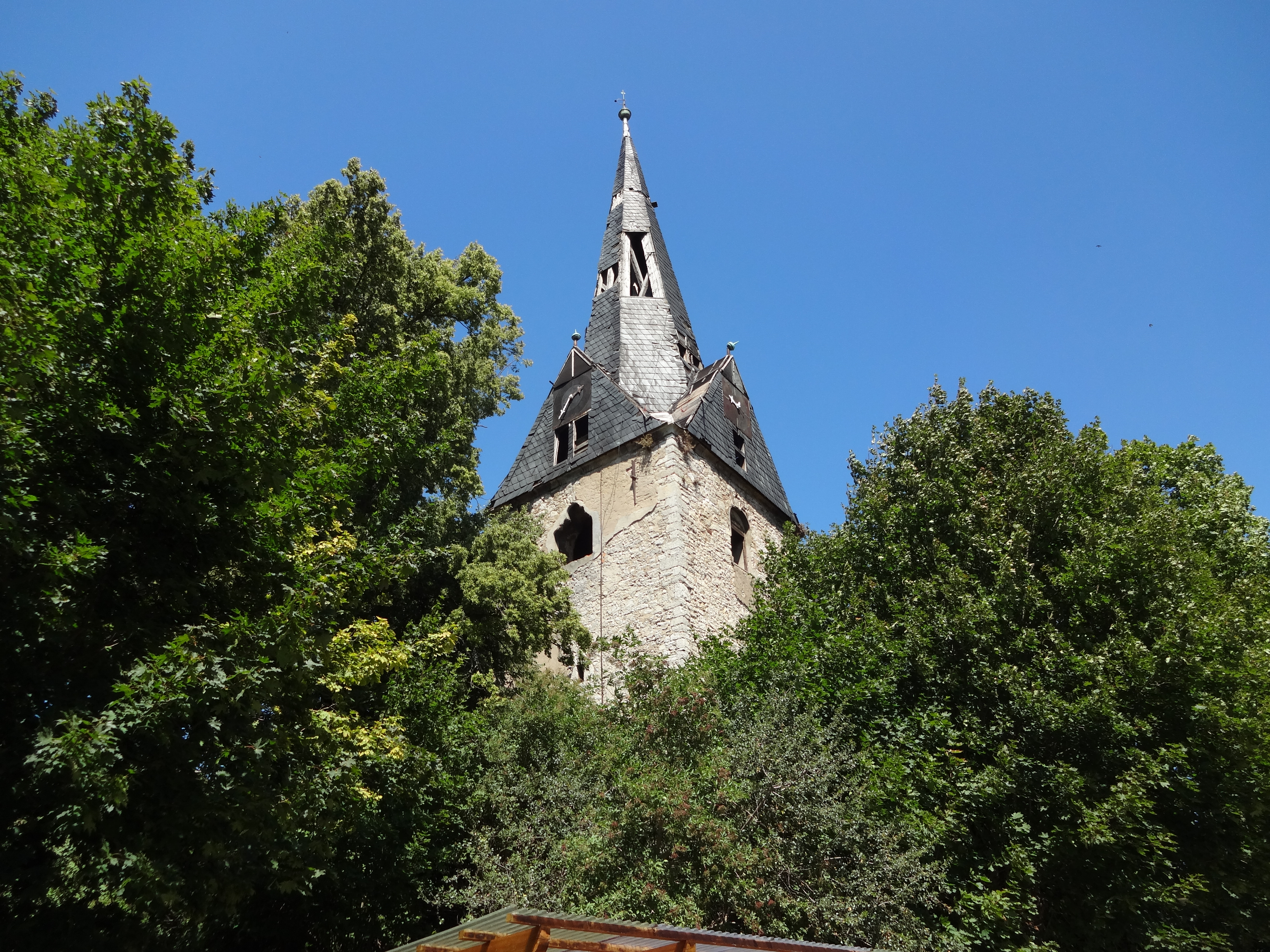 denkmalgeschützte Ruine der St. Johanneskirche in Dedeleben